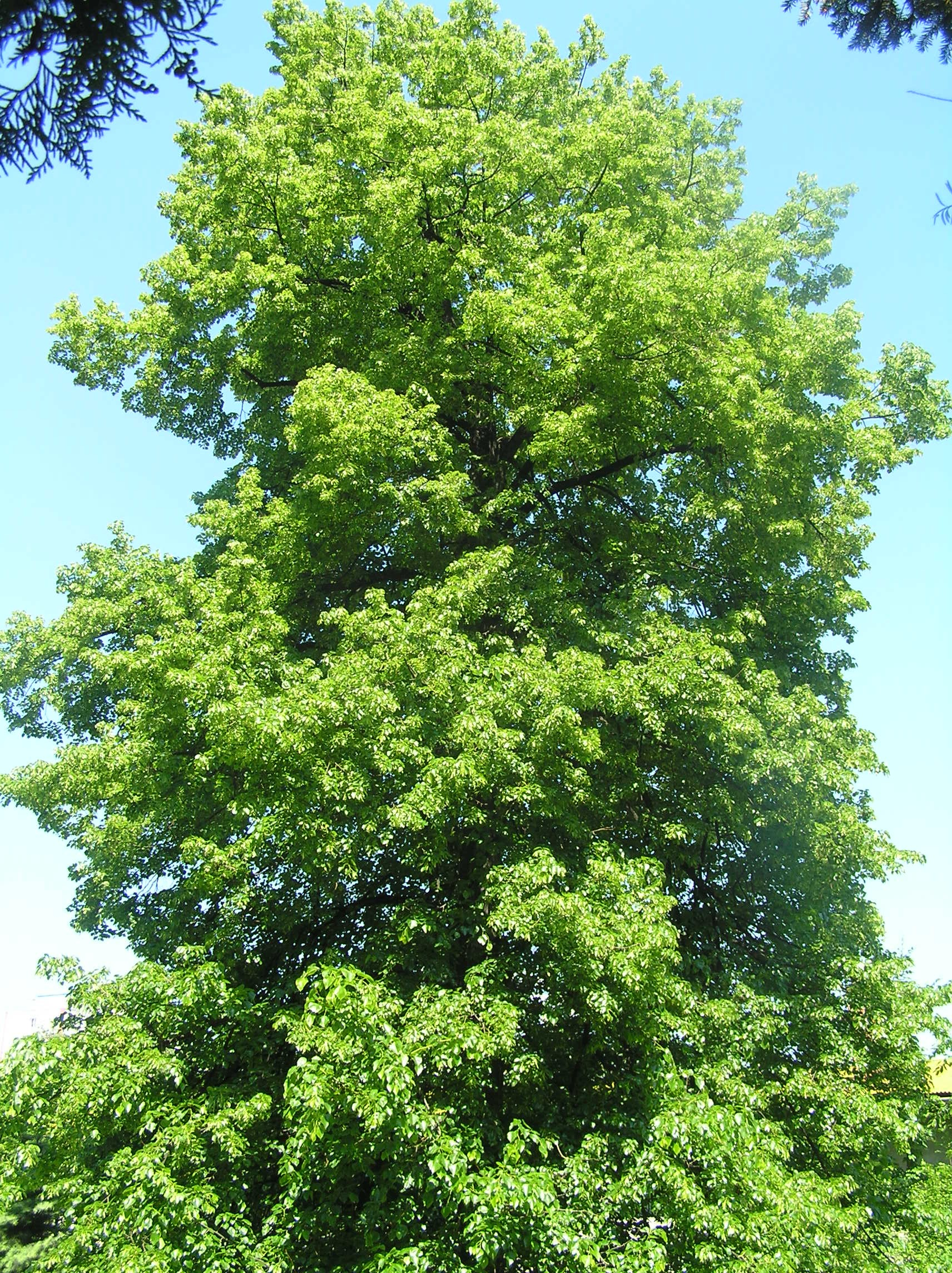 Tilia × euchlora, cultivated in Lipník nad Bečvou, Czech Republic